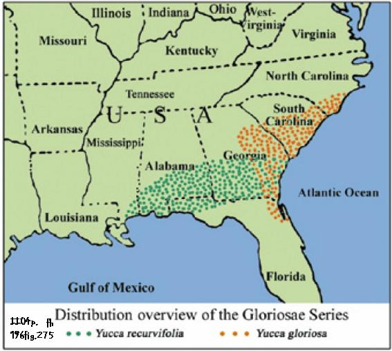 Verberizungsgebiet von Yucca Seckion Yucca Serie Gloriosae